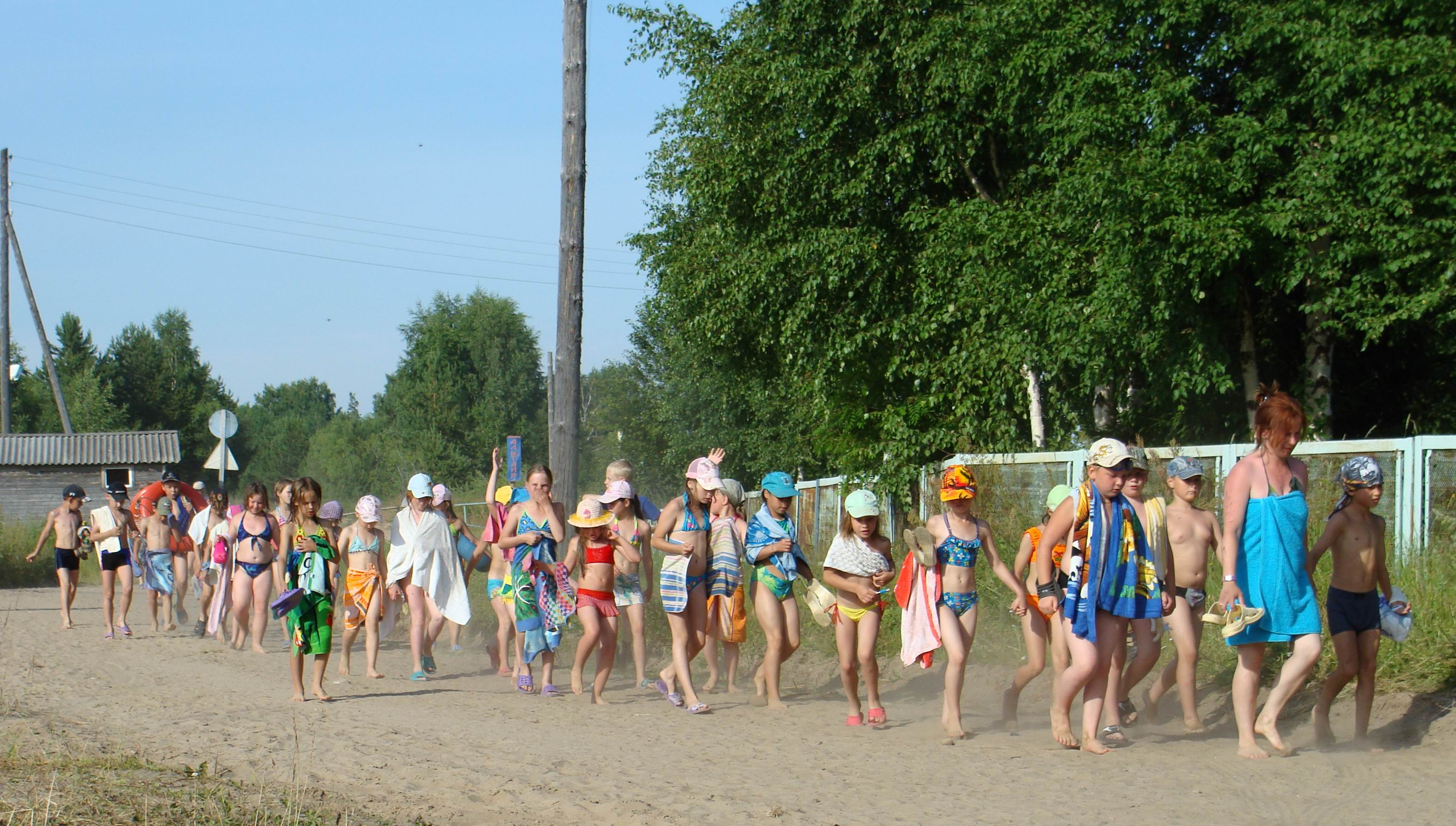 Детский оздоровительный лагерь "Альтаир"